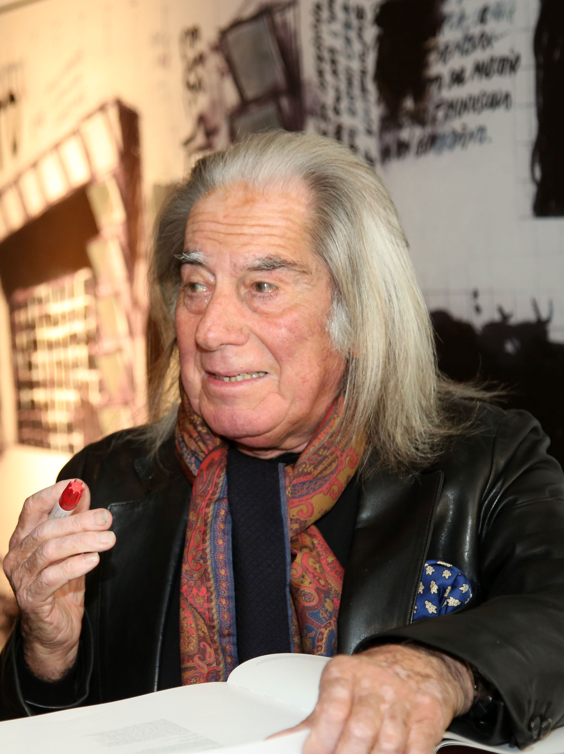 Fabrizio Plessi bei der Vernissage der Ausstellung "IQUID LABYRINTHS" in der Galerie Wien (Weihburggasse 26) am 9. April 2015.